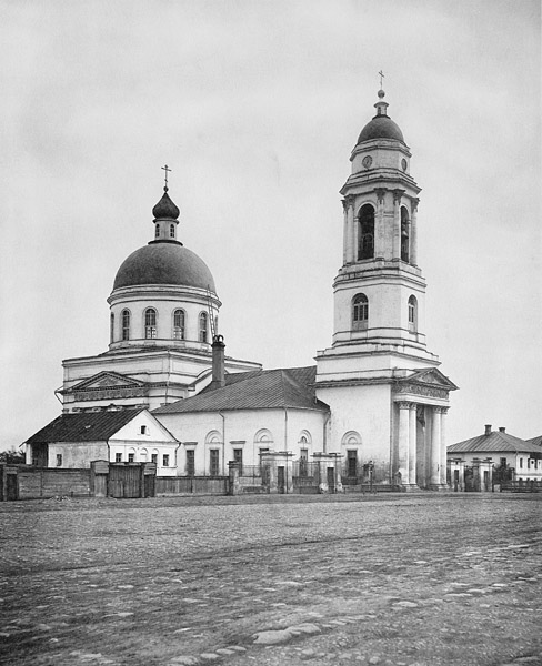 Храм Флора и Лавра на Зацепе известный также, как Храм иконы Божией Матери «Всех скорбящих Радость» (г.Москва, ул. Дубининская, 9).